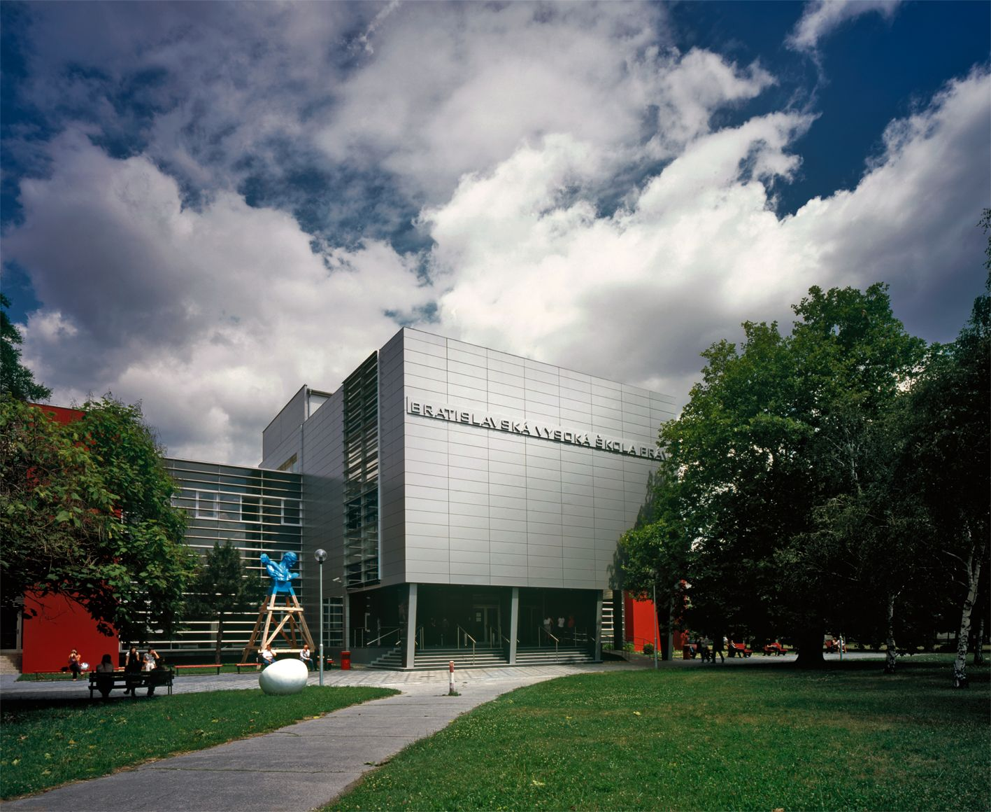 Paneurópska vysoká škola